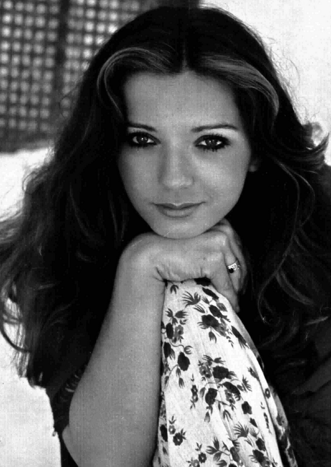 Italian actress Simona Izzo